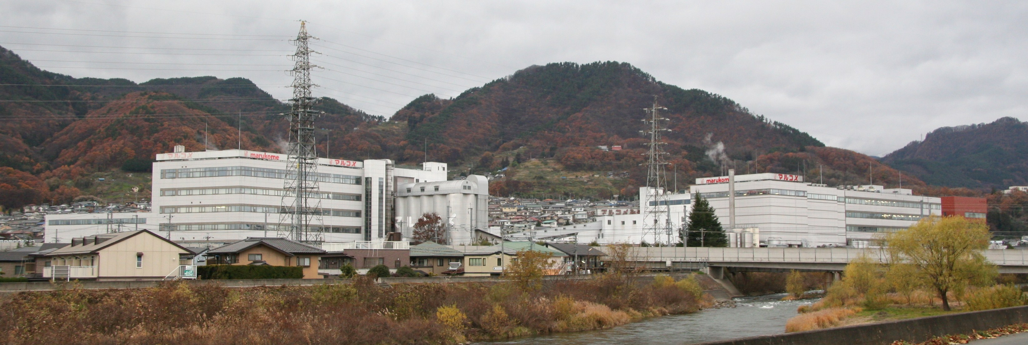 Marukome